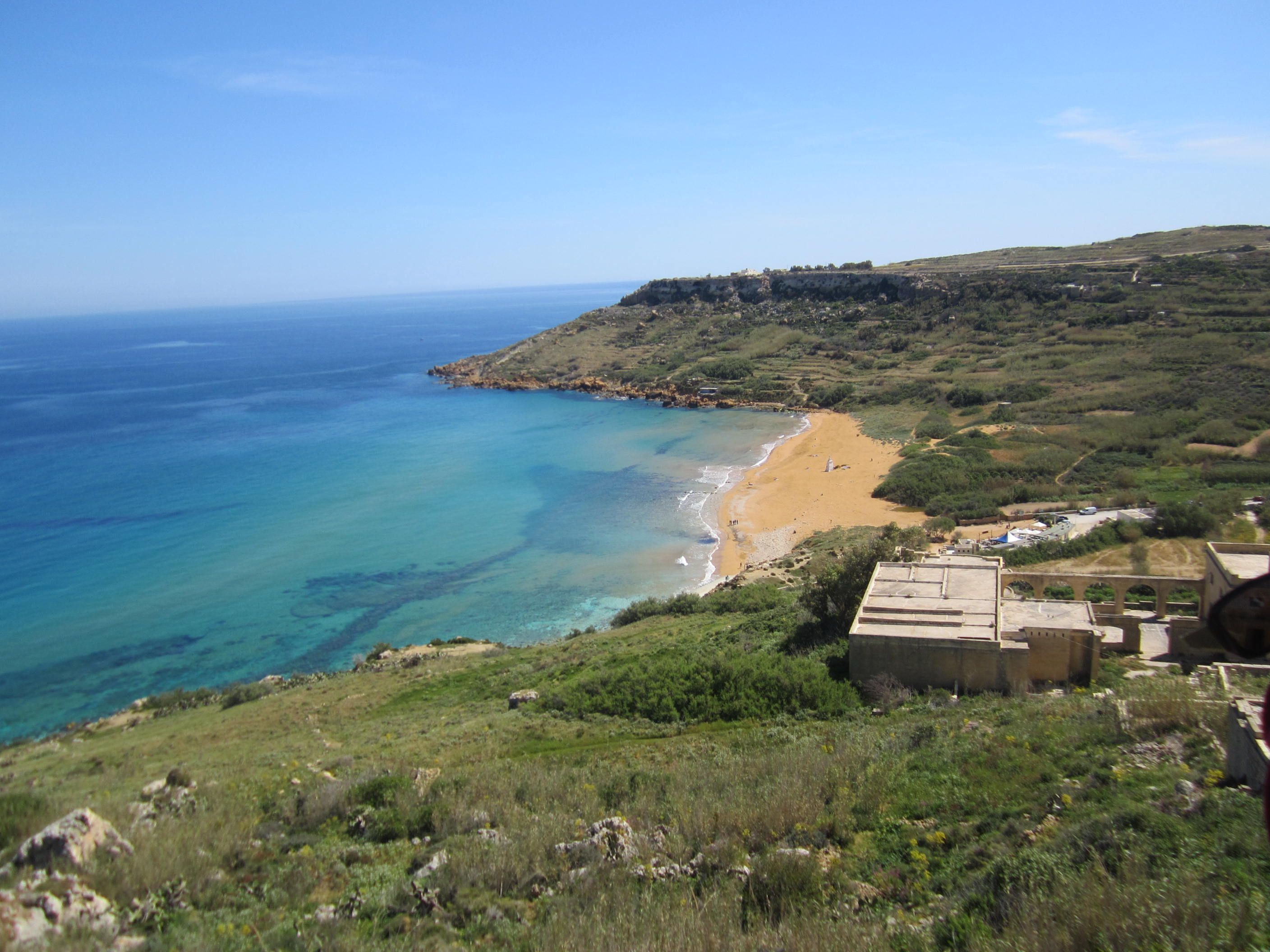 Veduta di Ramla Bay a Gozo